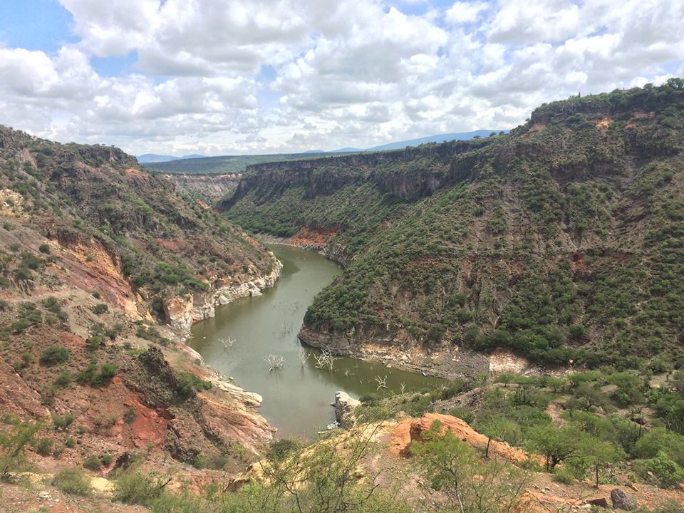 El valle fluvial de la comunidad de Xidhí